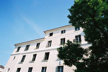 Fondation Argentine, Cité internationale universitaire de Paris